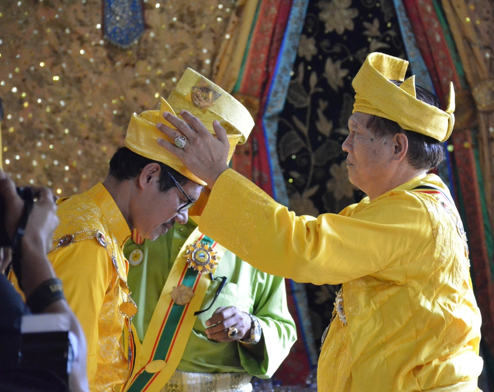 Gubernur Sumbar dianugerahi gelar dari Daulat Yang Dipertuan Rajo Alam Pagaruyung